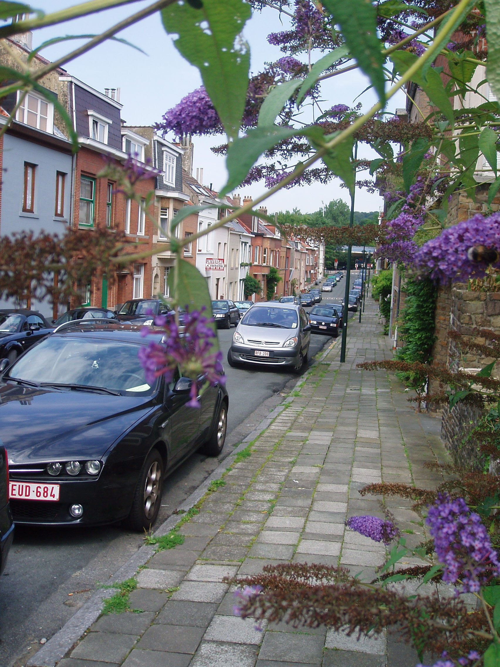 Rue Pierre Schoonejans Auderghem Belgium